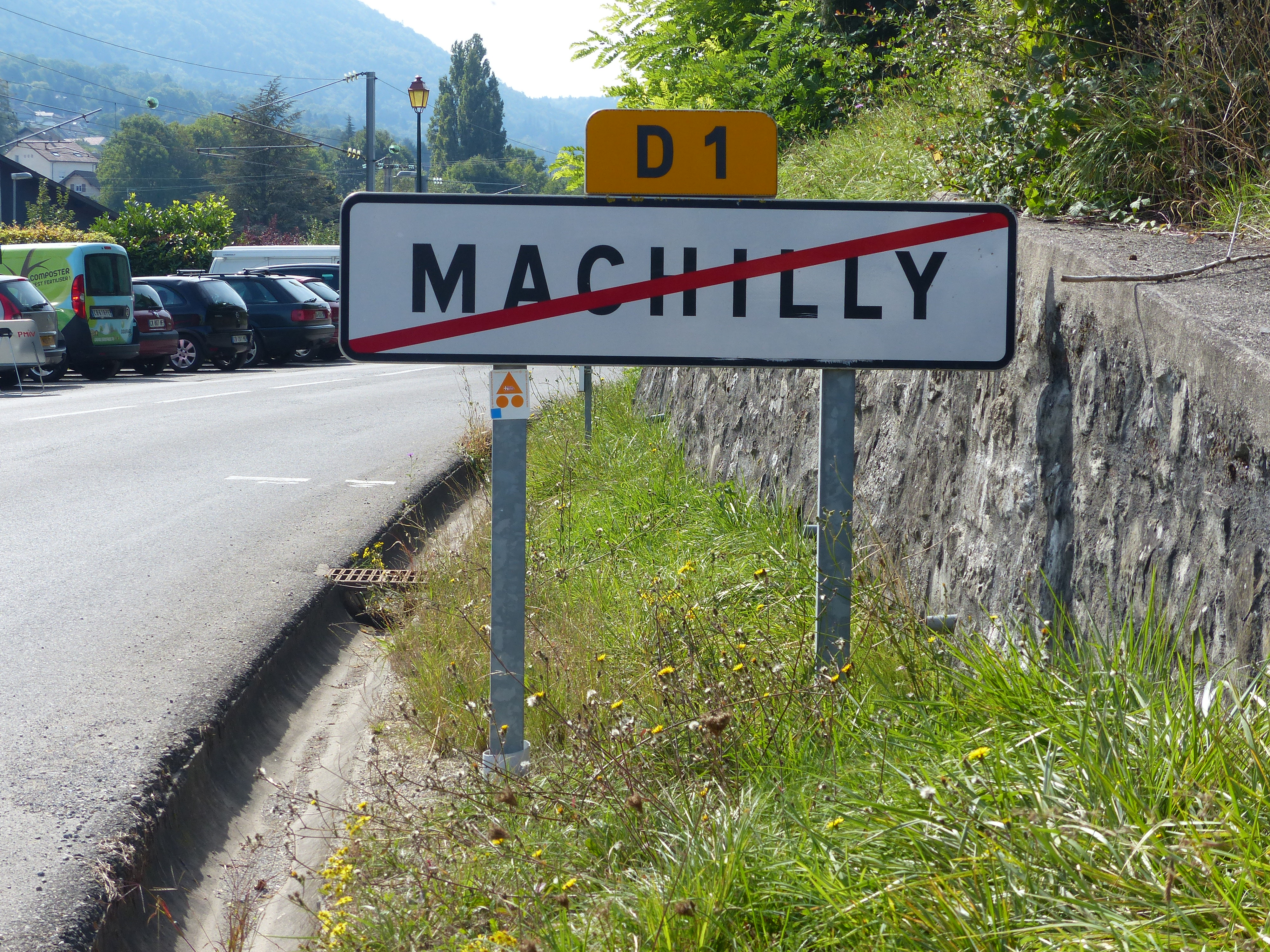 Panneau EB20 Machilly D1